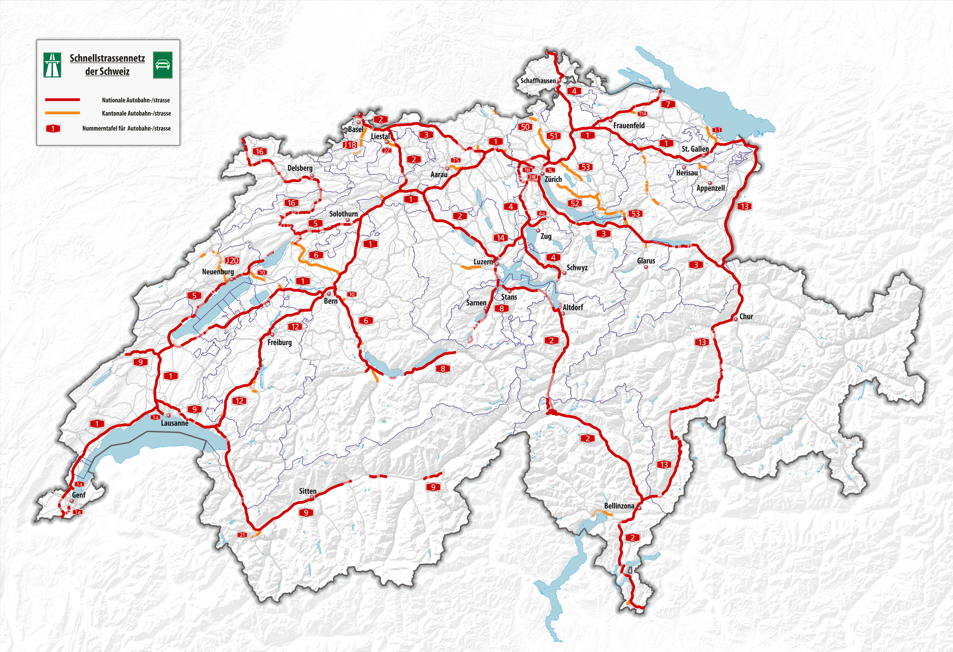 Schellstrassennetz der Schweiz Stand 2018